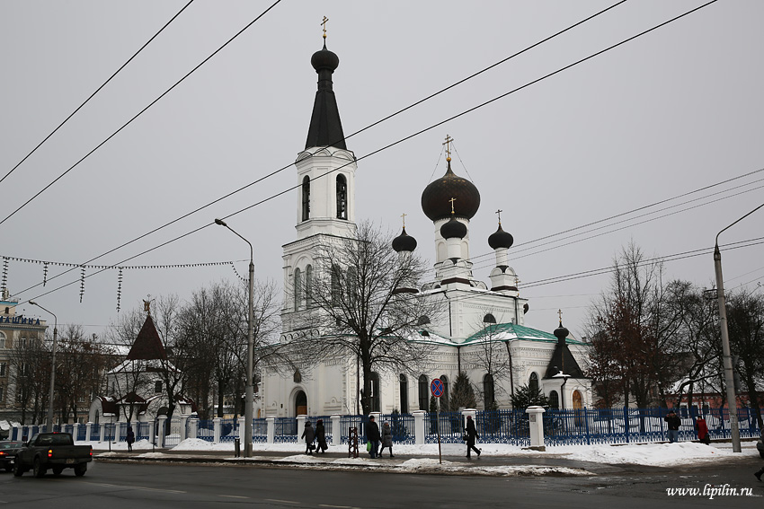 Магілёў. Сабор Трох Свяціцелей